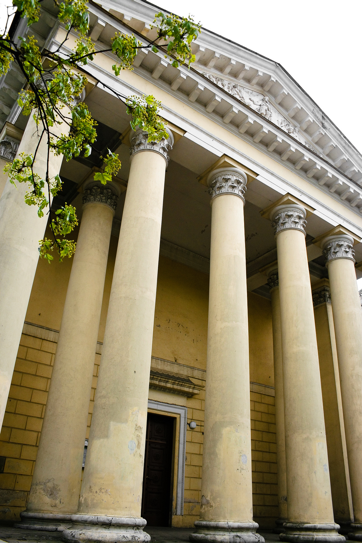 Evangelican Reformers' Church in Vilnius. (Karol Podczaszyński, 1829-1835)